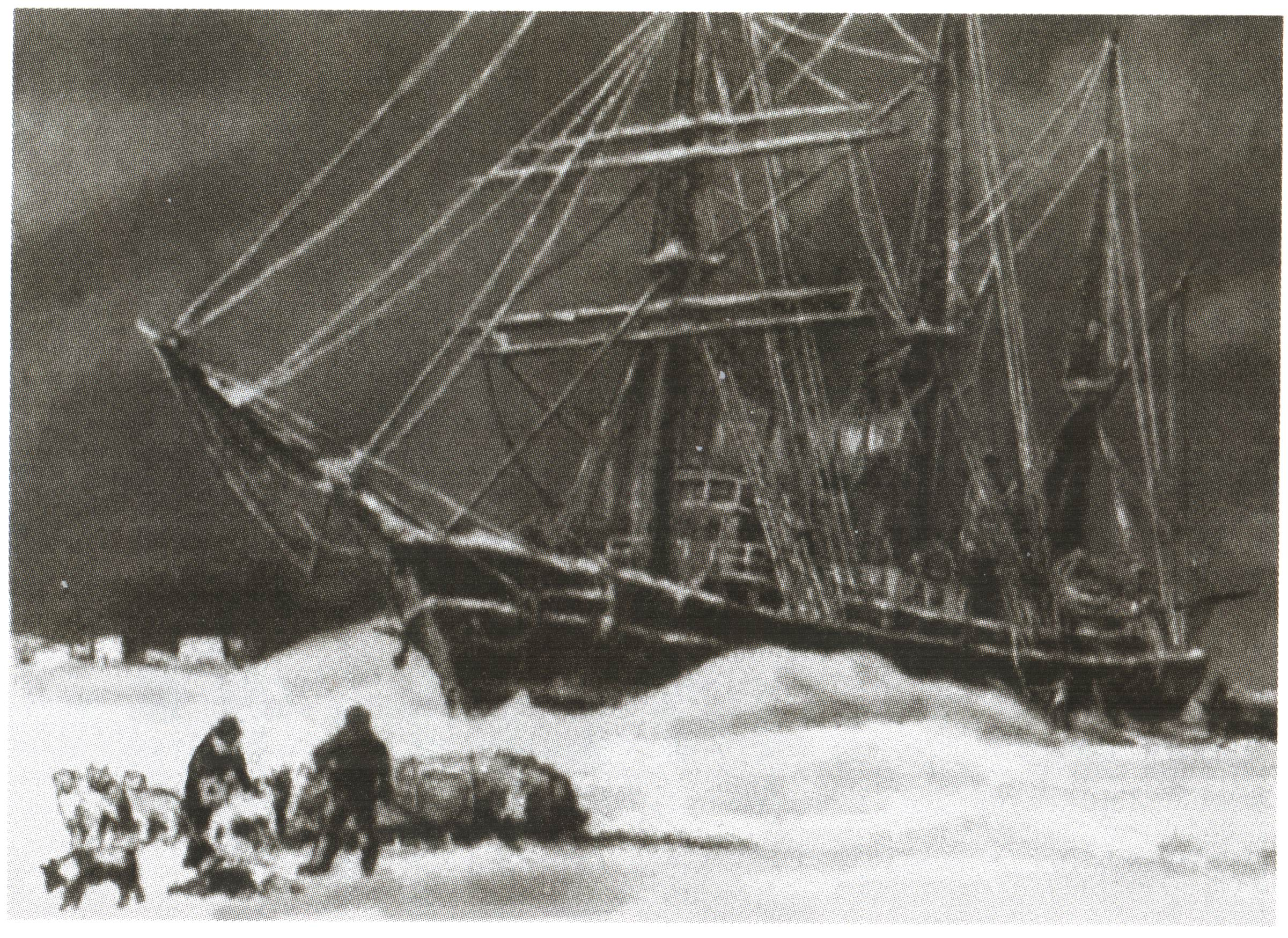 "Заря" во льдах. Рисунок участника экспедиции.